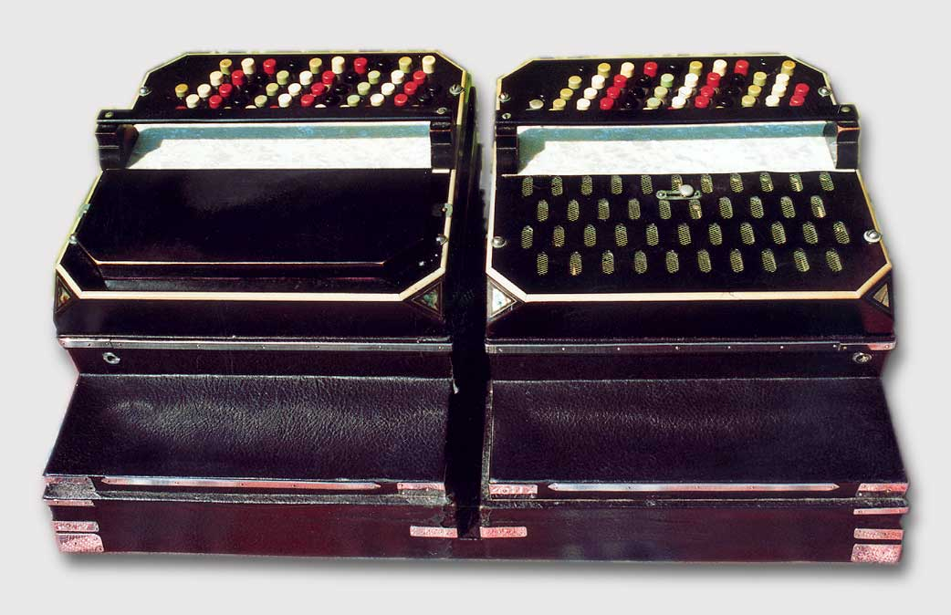 Symphonetta